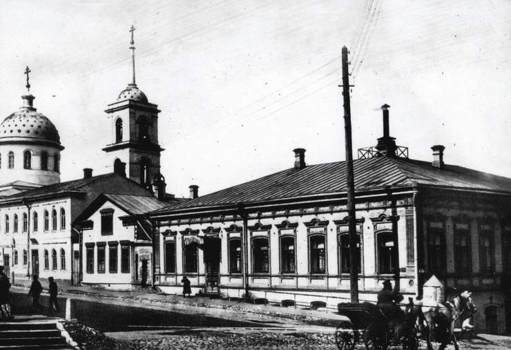 Вознесенская приходская церковь. ~1905 год.